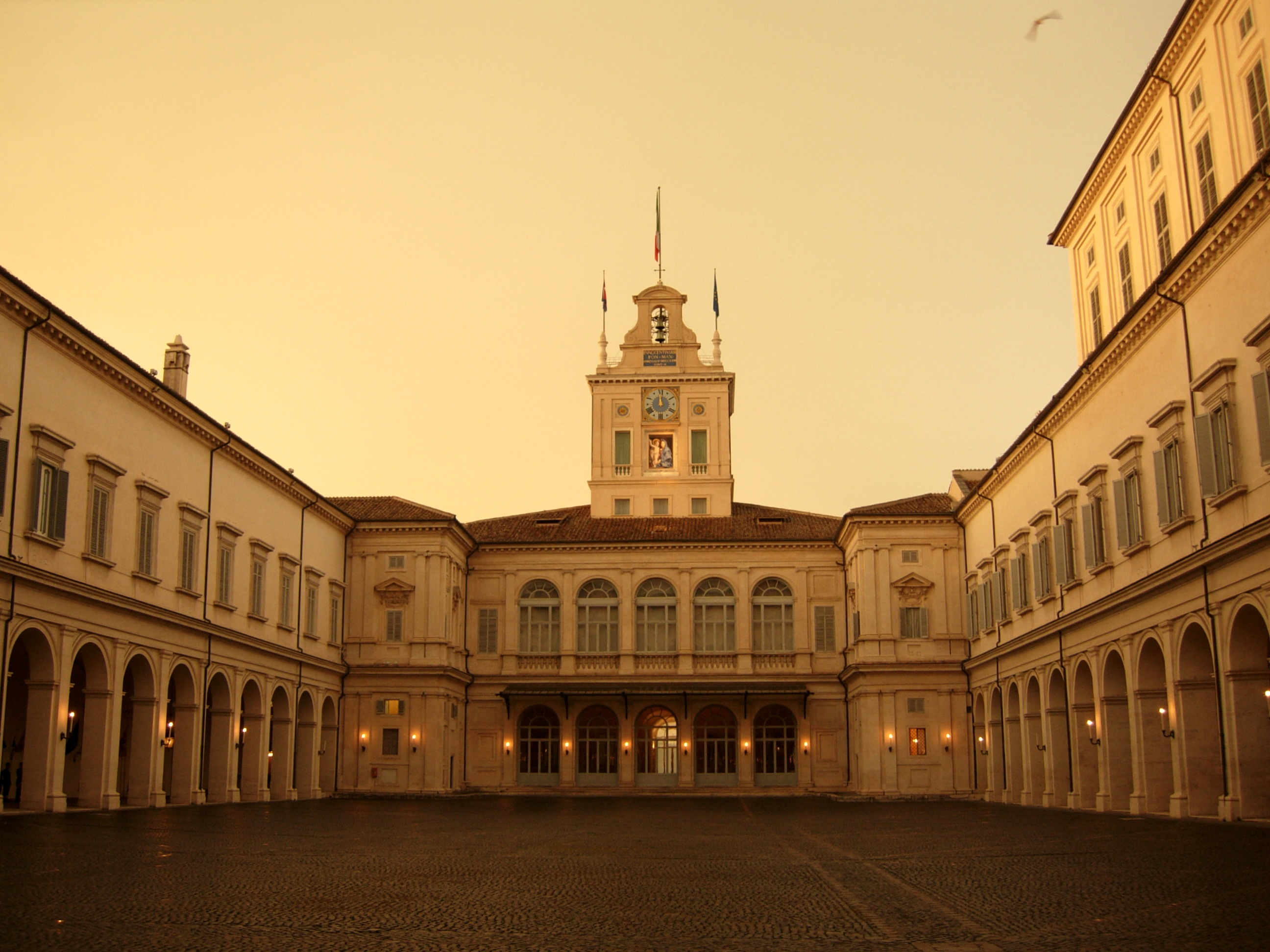 Cortile interno Palazzo del Quirinale, Roma